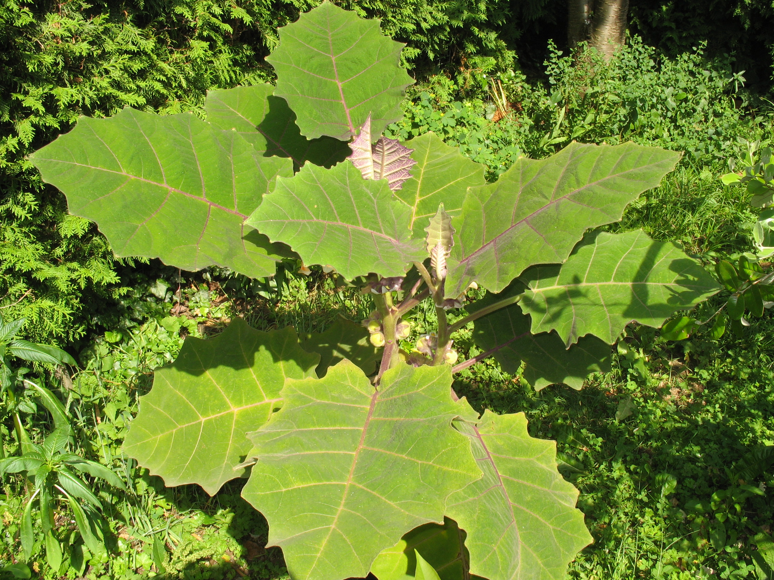 Solanum quitoense , Lulo , Naranjilla